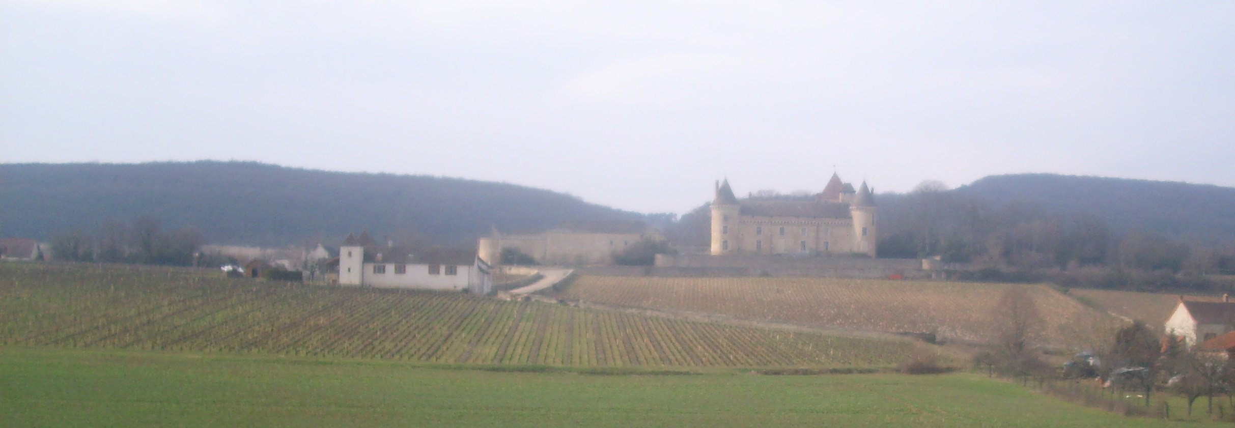 Vue d'une partie du vigoble de Rully et son château